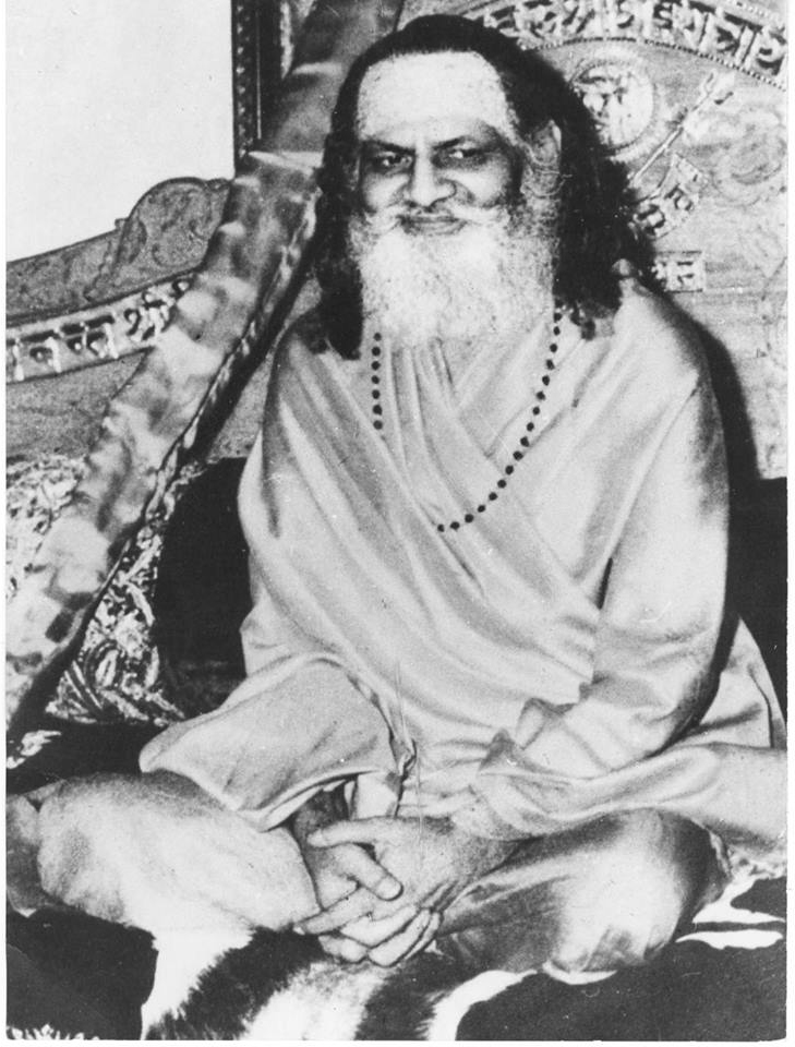 Guru Dev Bramanada Saraswati